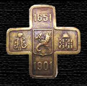 Badge of Charkovsky 4-th Ulan Regiment Знак 4 уланского (б. казачьего) полка с гербом Харькова к 250-летию полка, 1901 год